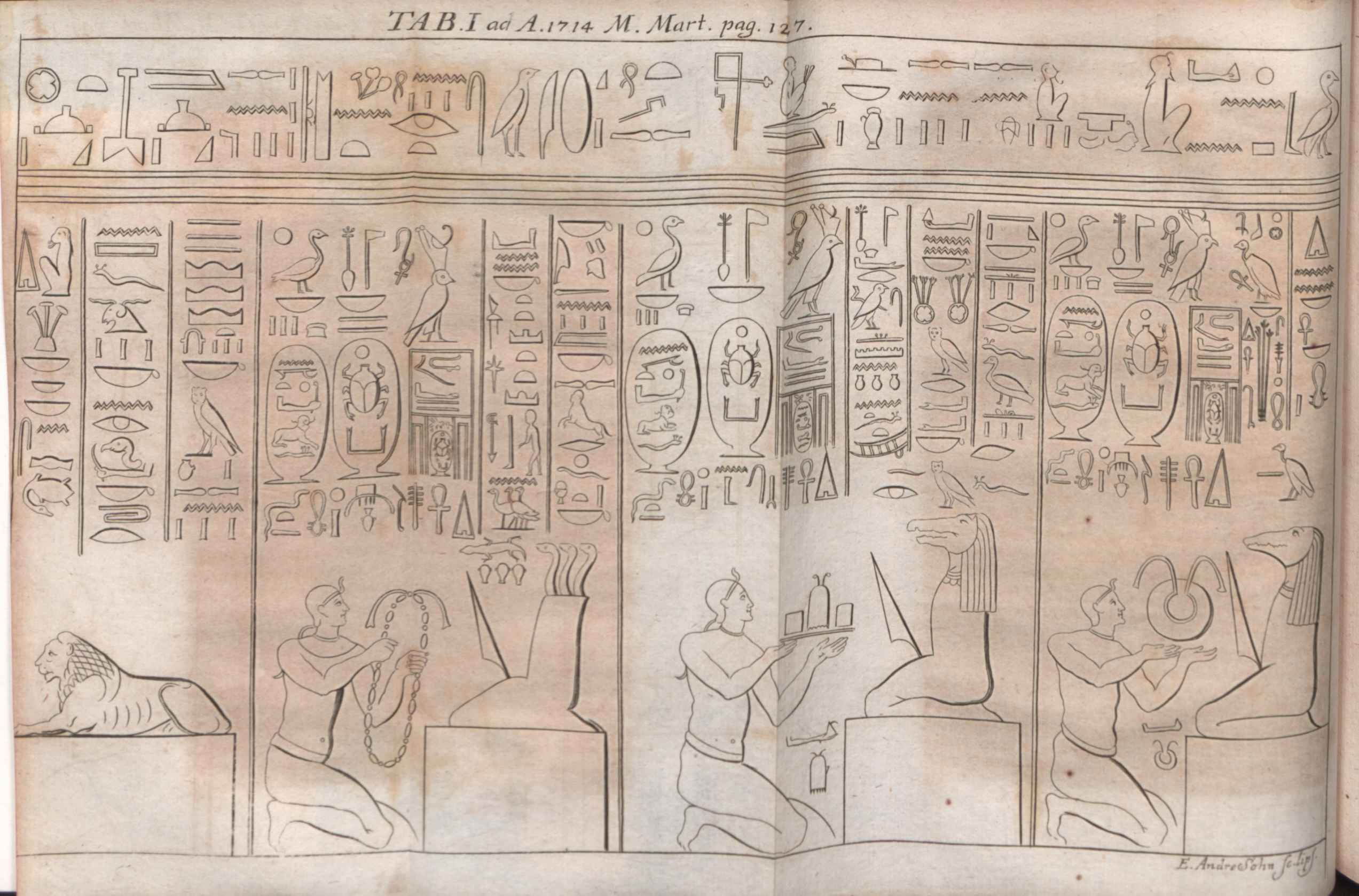 Illustration